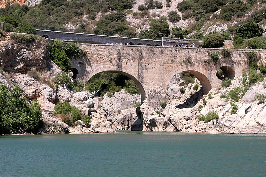 Pont du Diable (Hérault), Hans-Dieter Niepötter